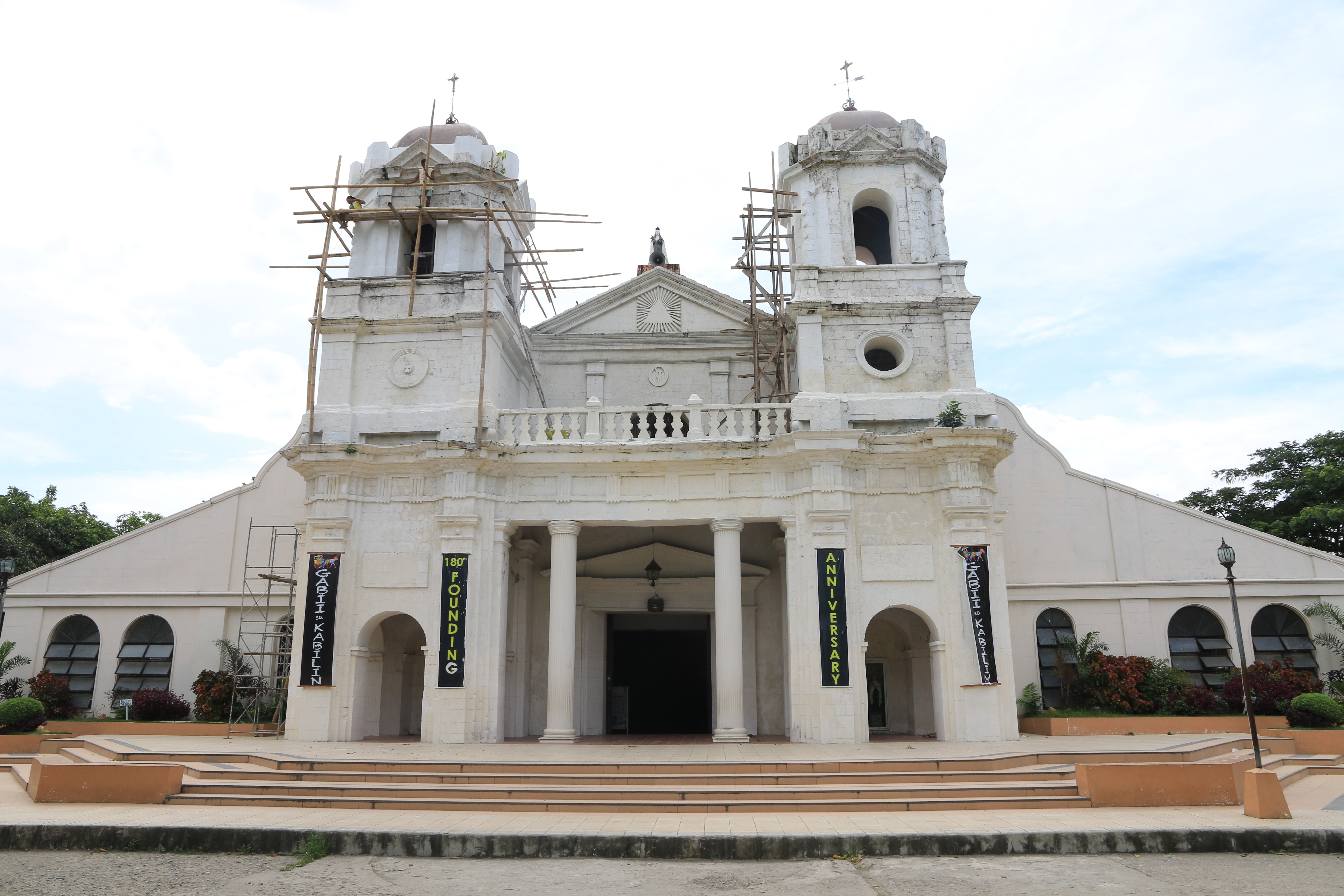 Saint Teresa of Ávila Church in Talisay, Cebu